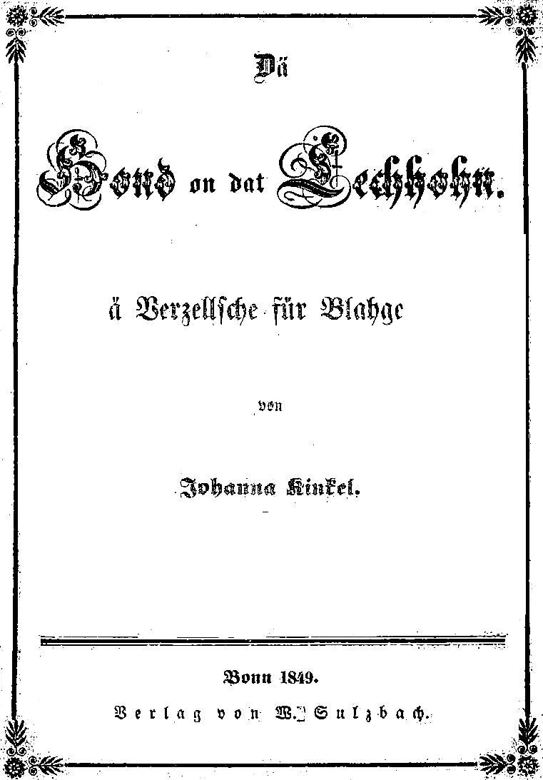 Titelblatt zu der im Jahr 1849 veröffentlichten Kindergeschichte von Johanna Kinkel, „Da Hond on dat Eechhohn. Ä Verzellsche für Blahge“; Bonn 1849; Verlag W. Sulzbach.